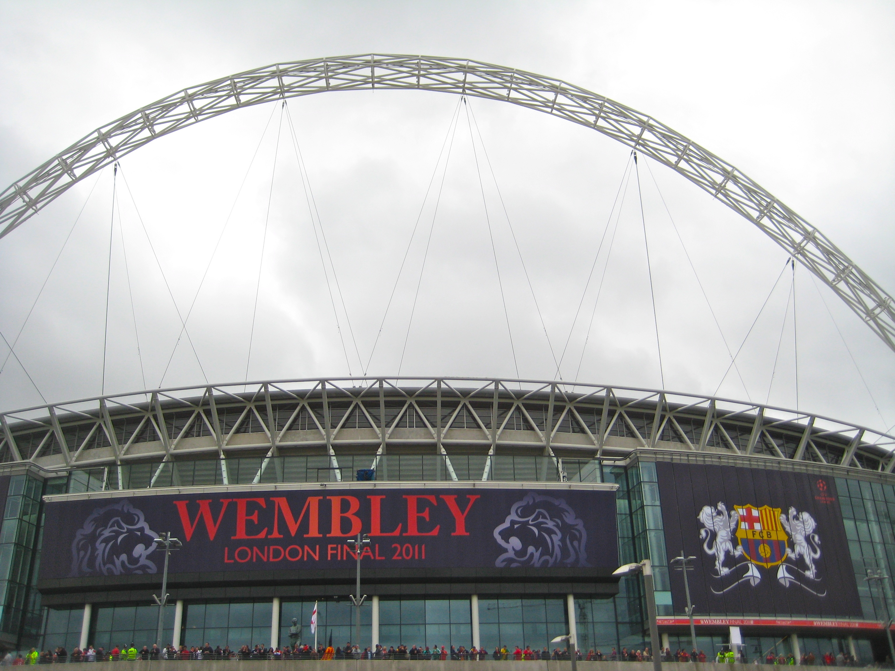 Vista exterior del estadio de Wembley acondicionado para la final de la UEFA Champions League 2011, que enfrentó al Manchester United contra el FC Barcelona.